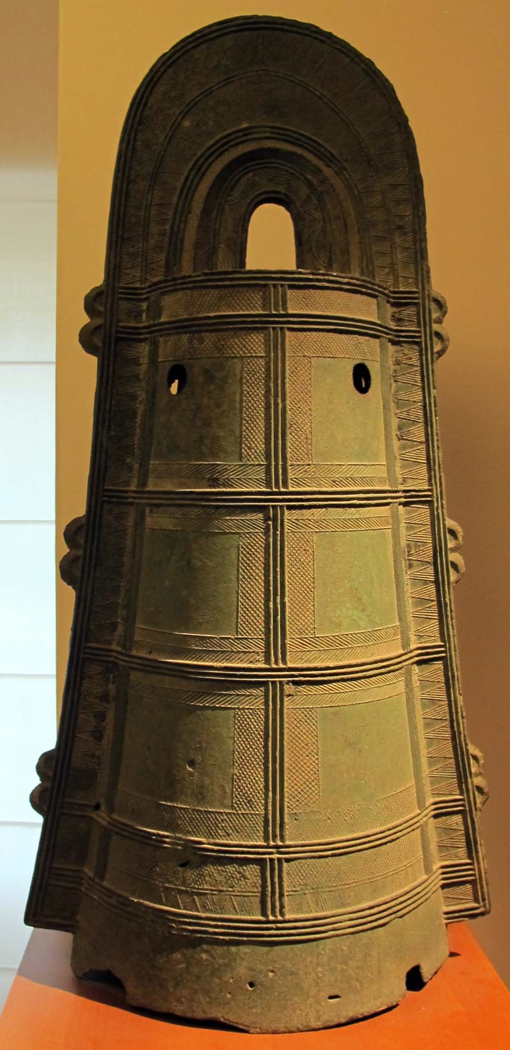 Epoca yaoi finale, campana rituale dotaku, da shizuoka, III sec